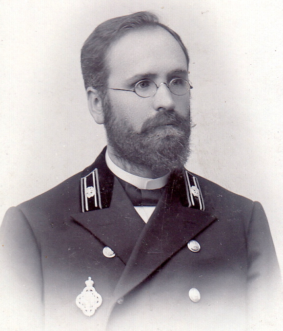 Mychajło Petrowycz Kobryn.